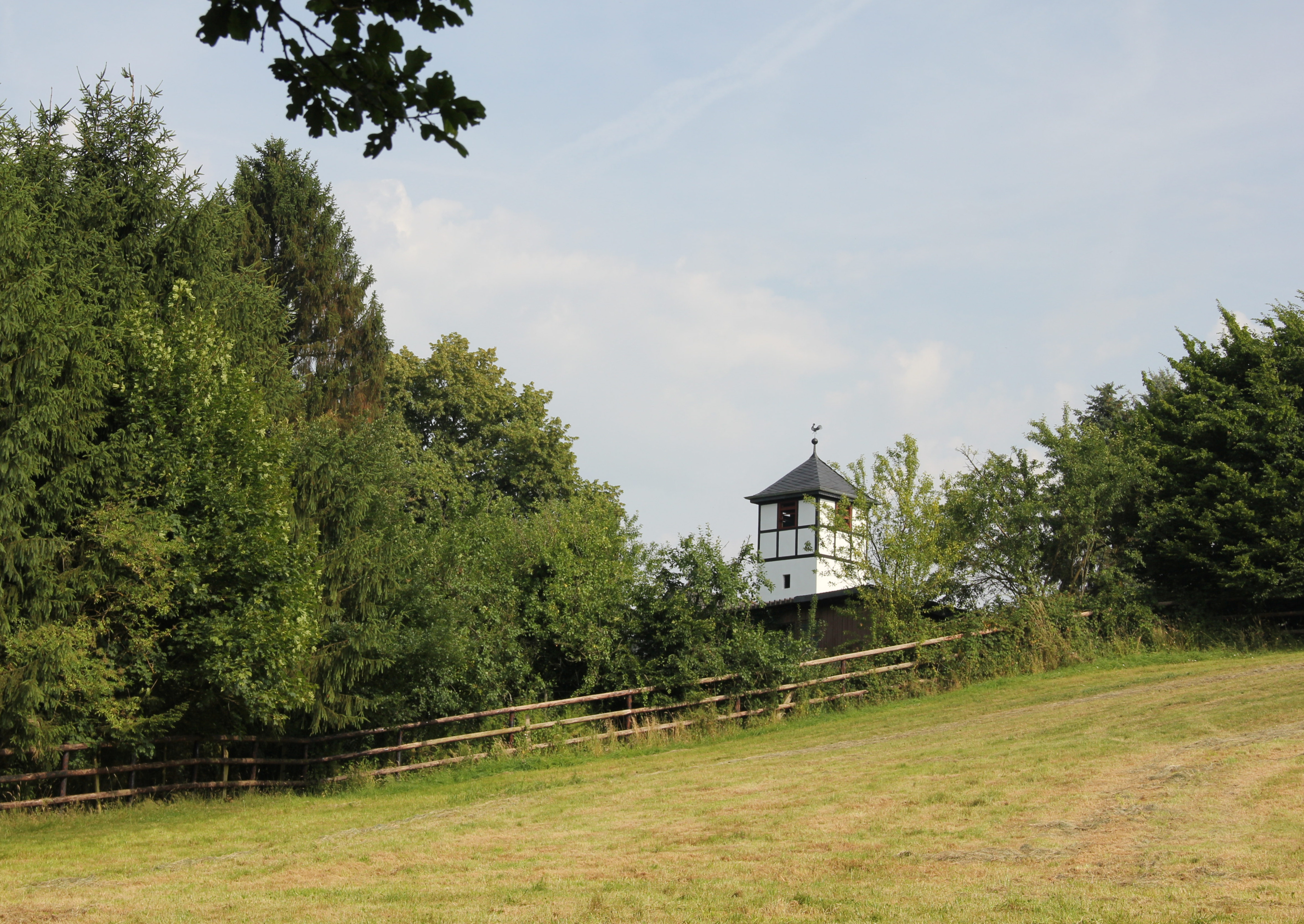 Turm der Kapelle von Lohmarhohn am 4. Juli 2015